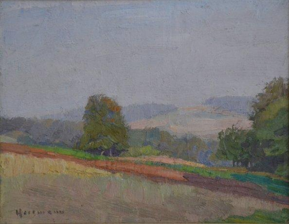 Landschaft von Ph. Herrmann. Öl auf Karton.